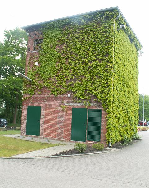 Kamp Versen